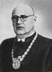 Abody Előd magyar mérnök, tanár, a műegyetemi Aerodinamikai Intézet alapítója. Teljes neve Abody Előd Anderlik.